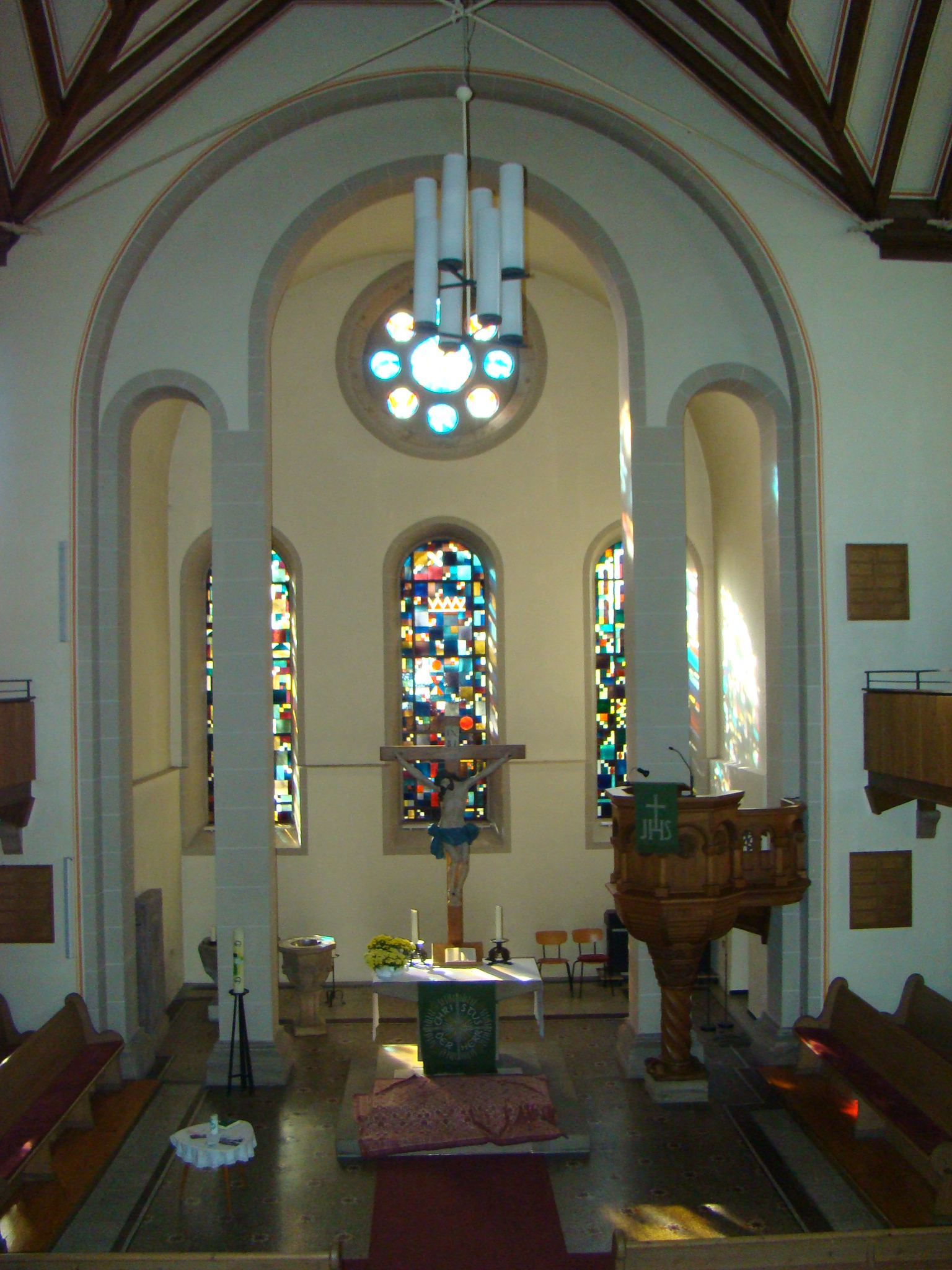 Johanneskirche in Untergruppenbach, Blick zum Chor. Foto: Peter Schmelzle (November 2011).